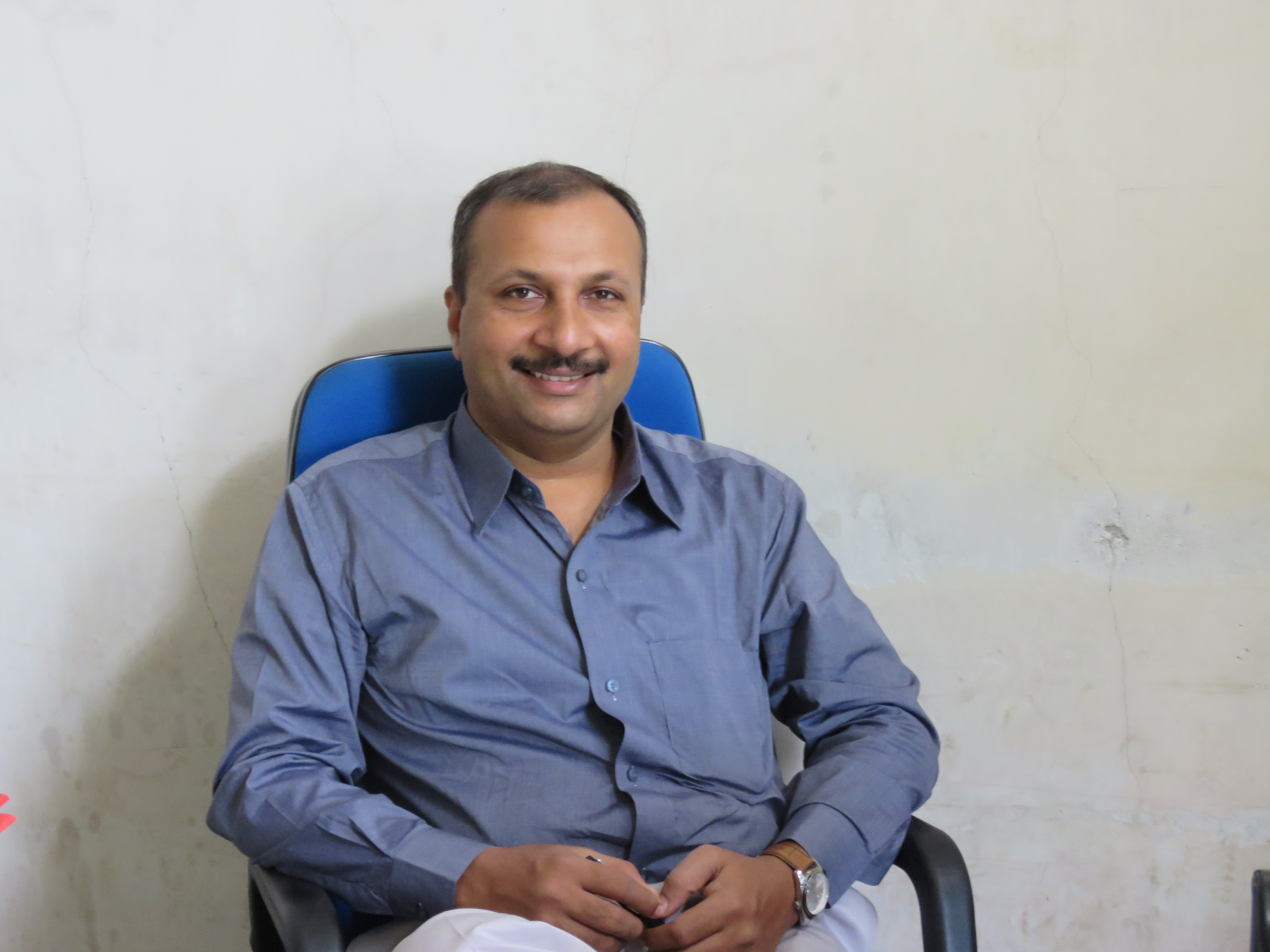 Nandkumar More